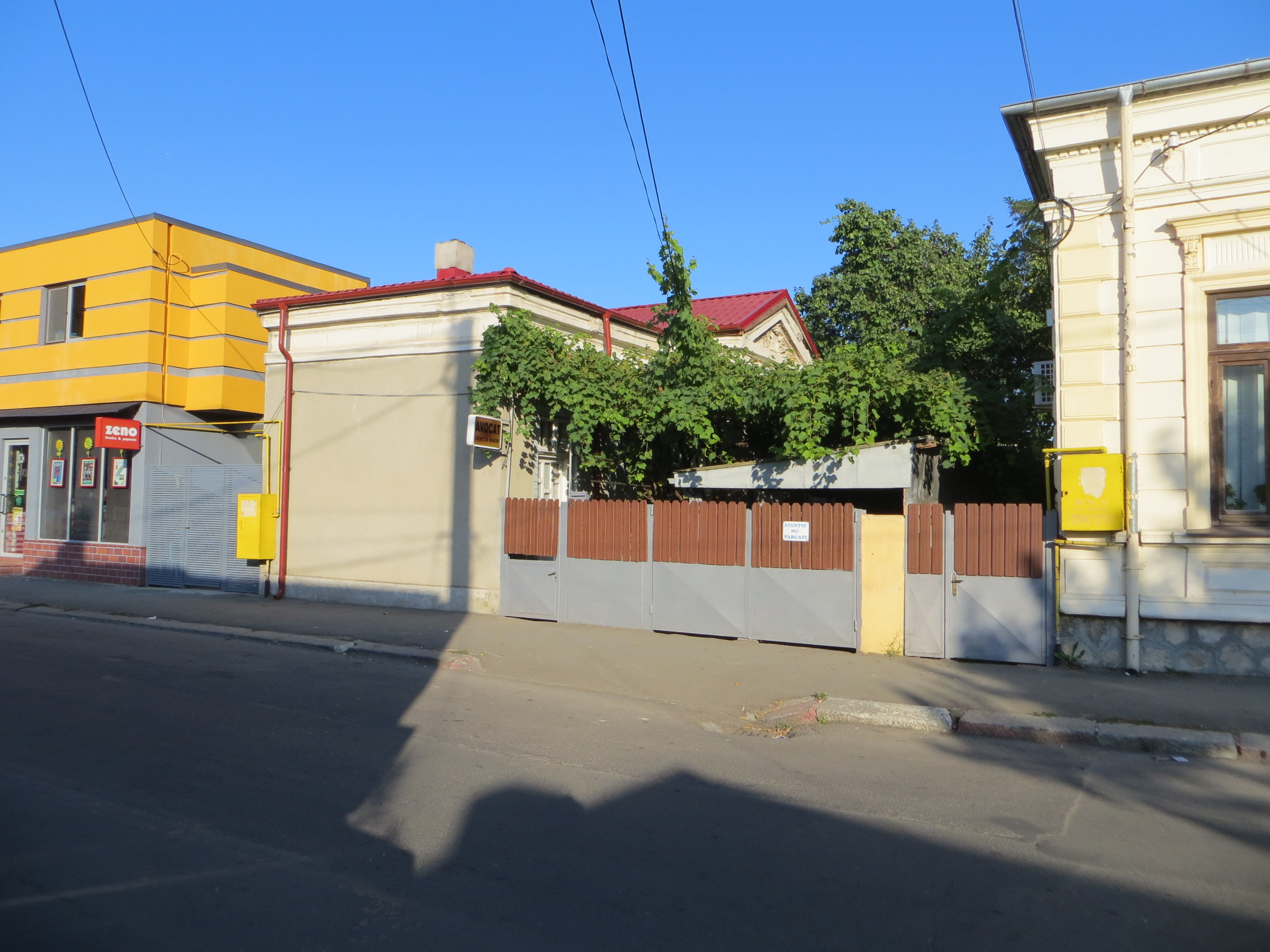 Casă pe str. 13 decembrie nr. 20